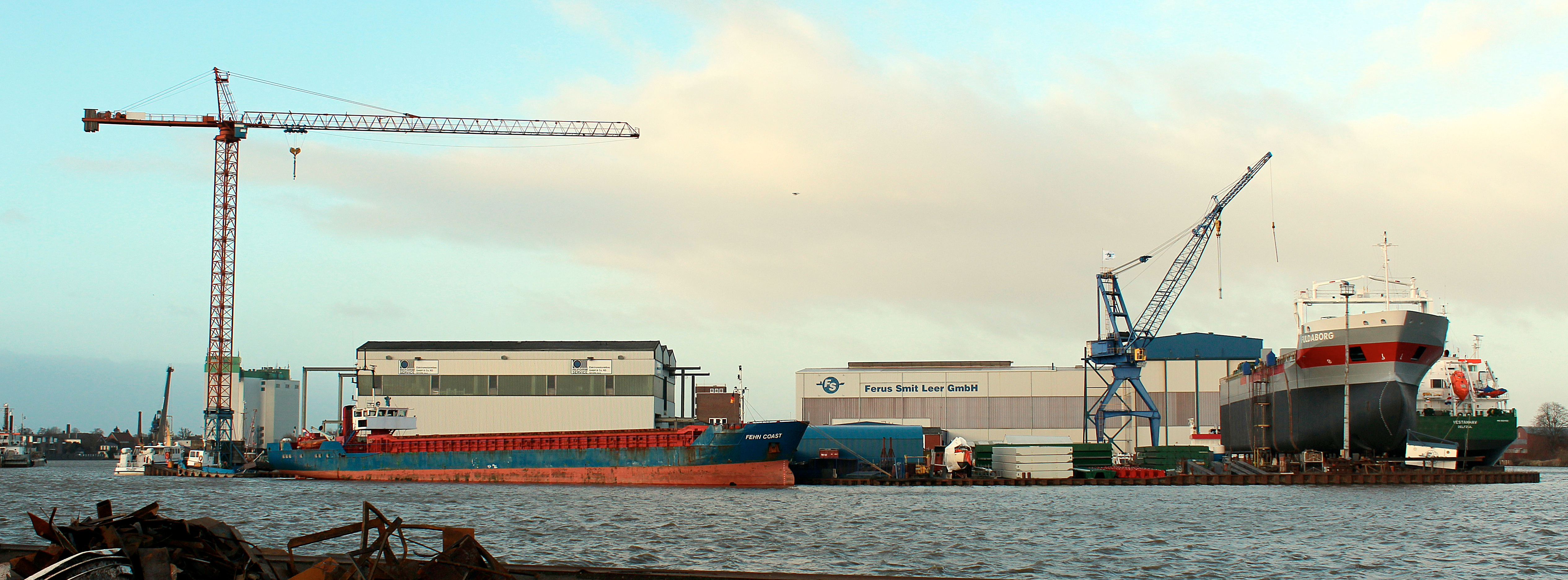 Die Werft Ferus Smit Leer (ehemalige Jansen Werft).